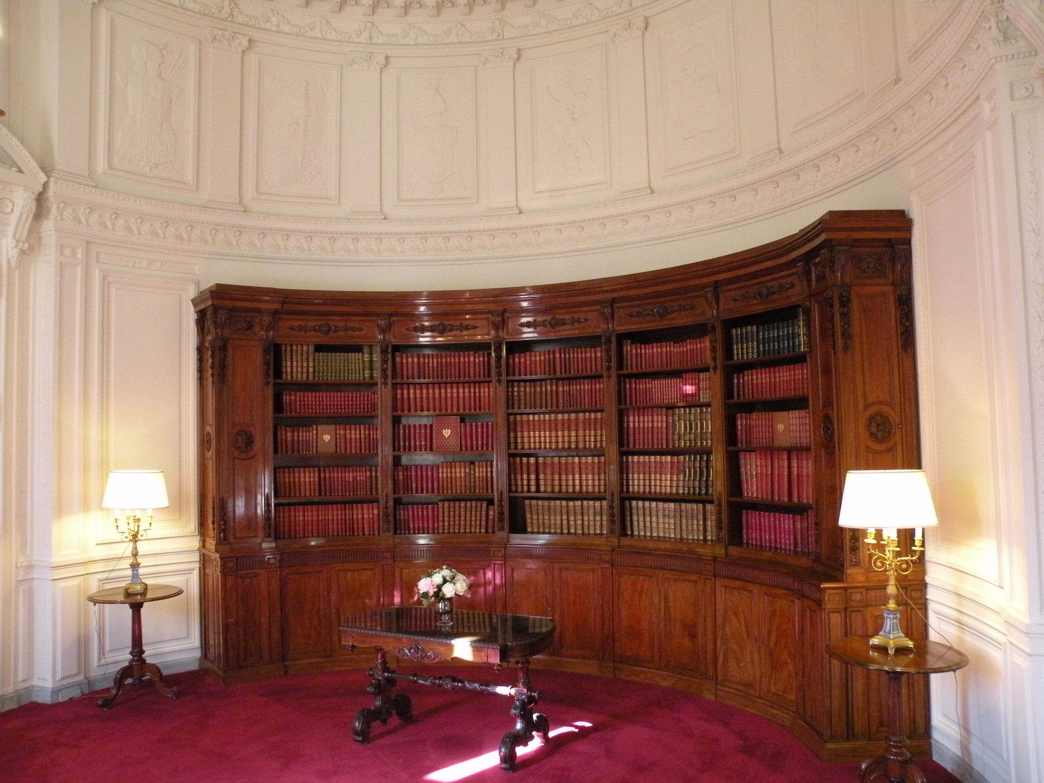 Bibliothèque Palais de l'Élysée